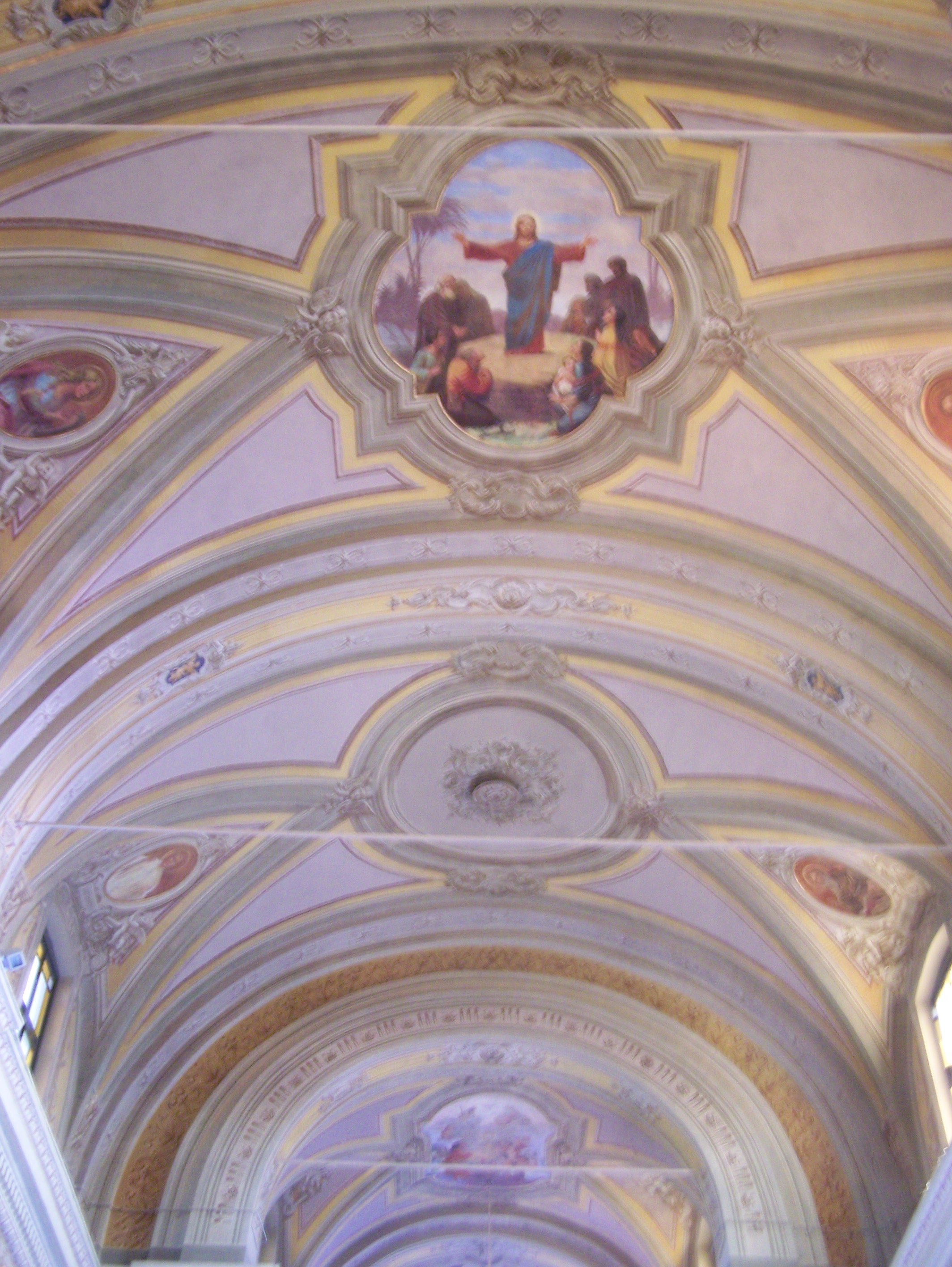 Le decorazioni pittoriche della volta della chiesa vecchia di Mesero (MI) - Italy